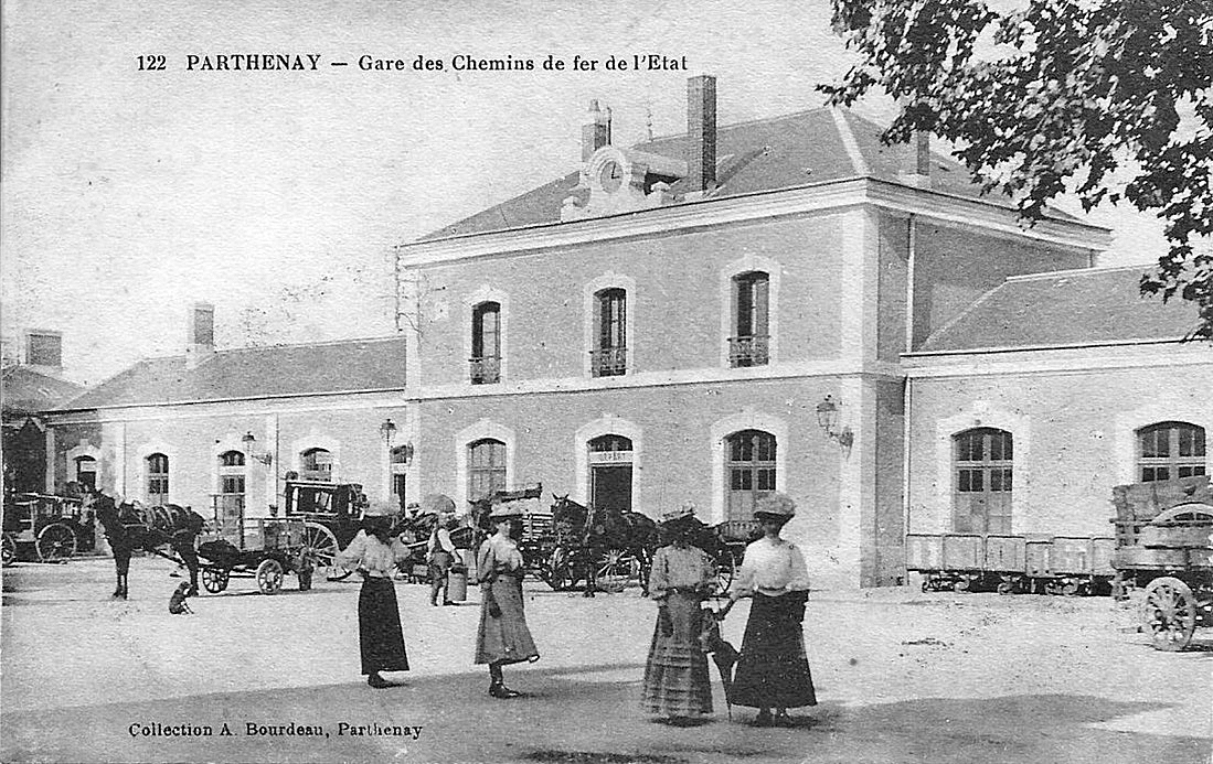 La place de la gare avec les voitures en attente des voyageurs.